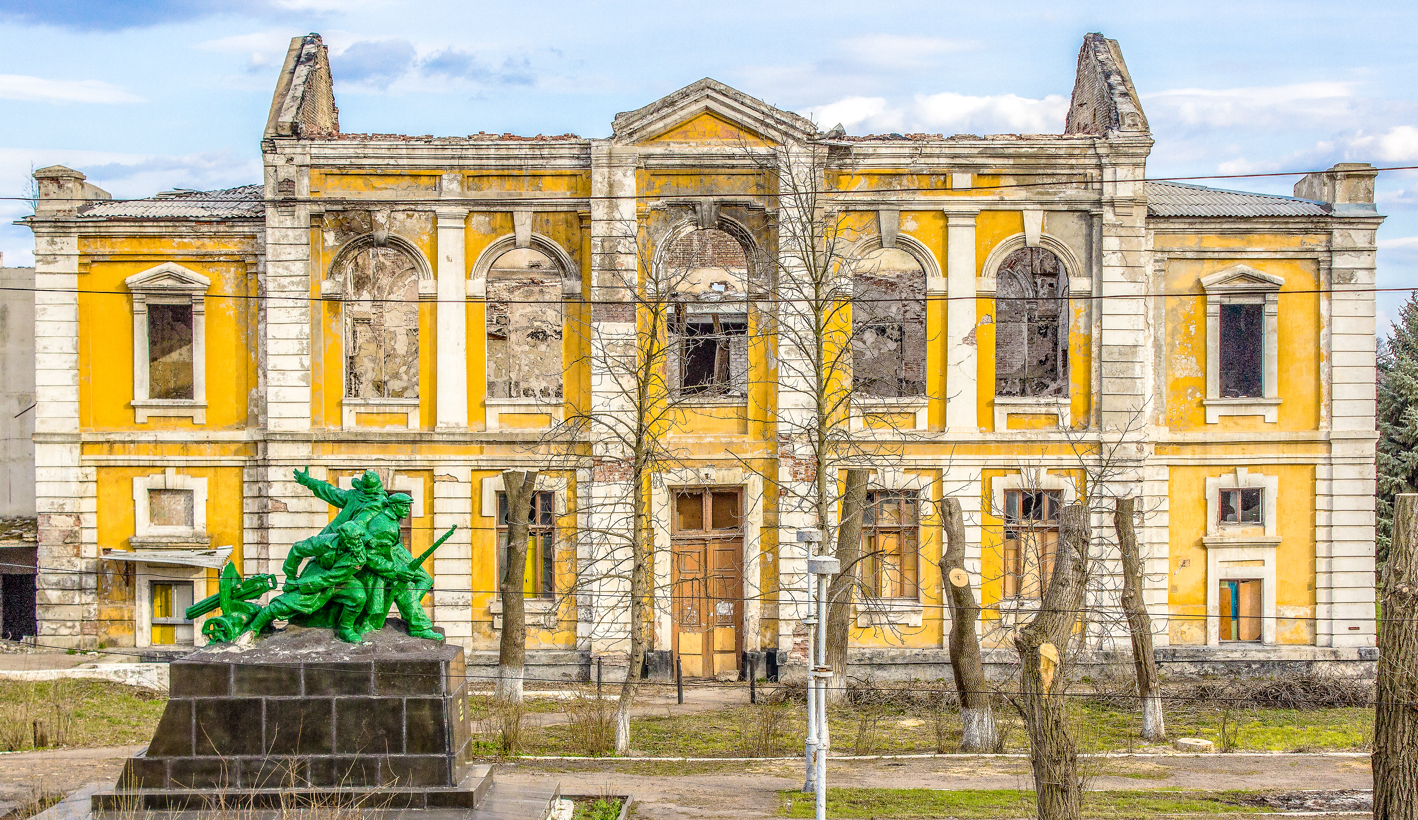 Одно из базовых строений, с которых начинался Лисичанск 20 века. Разрушено не временем - безалаберными политиками начала 21-го...